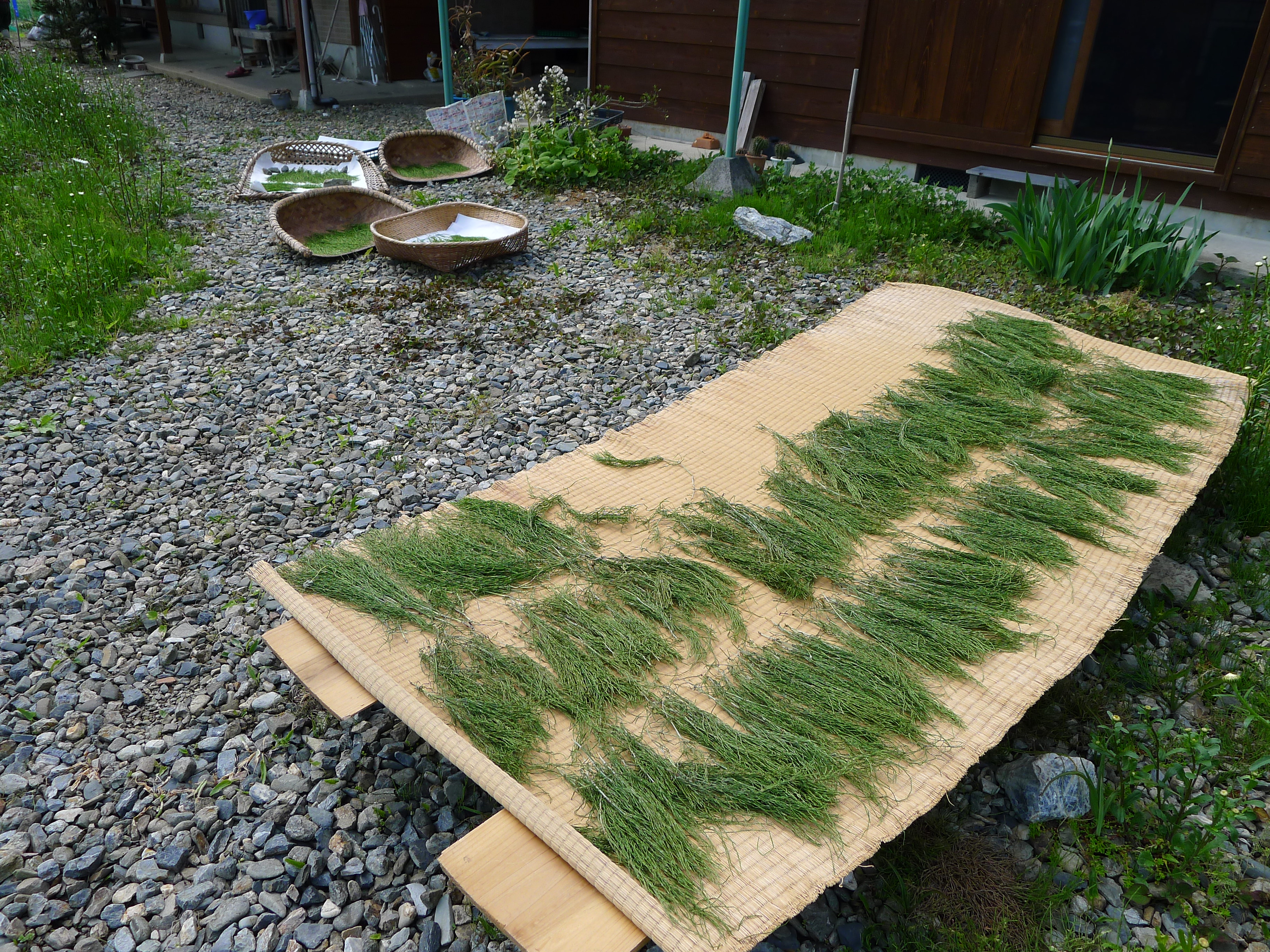 民家庭先でのスギナ干し、美山かやぶきの里（京都府南丹市）にて